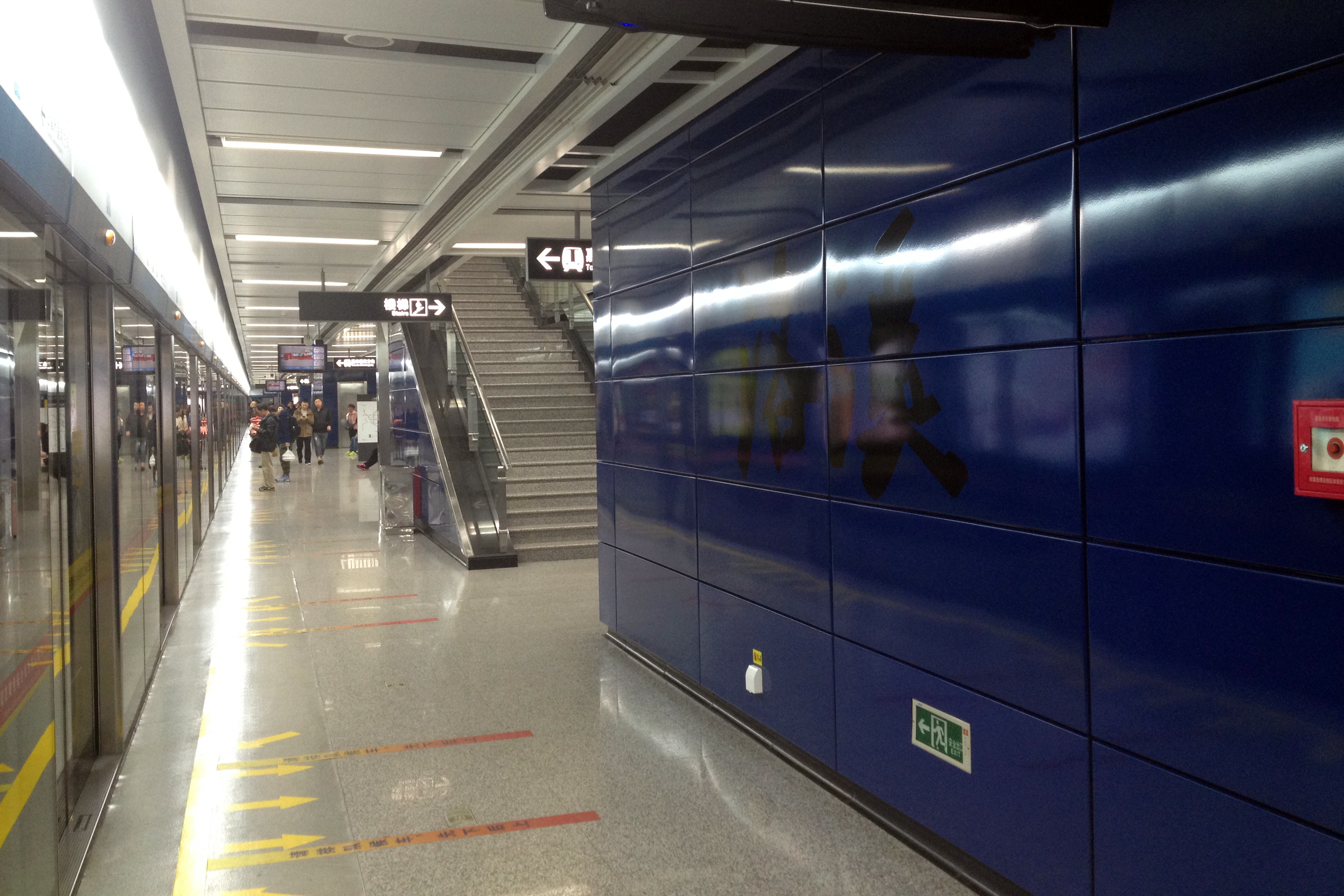 广州地铁洛溪站月台（嘉禾望岗方向）